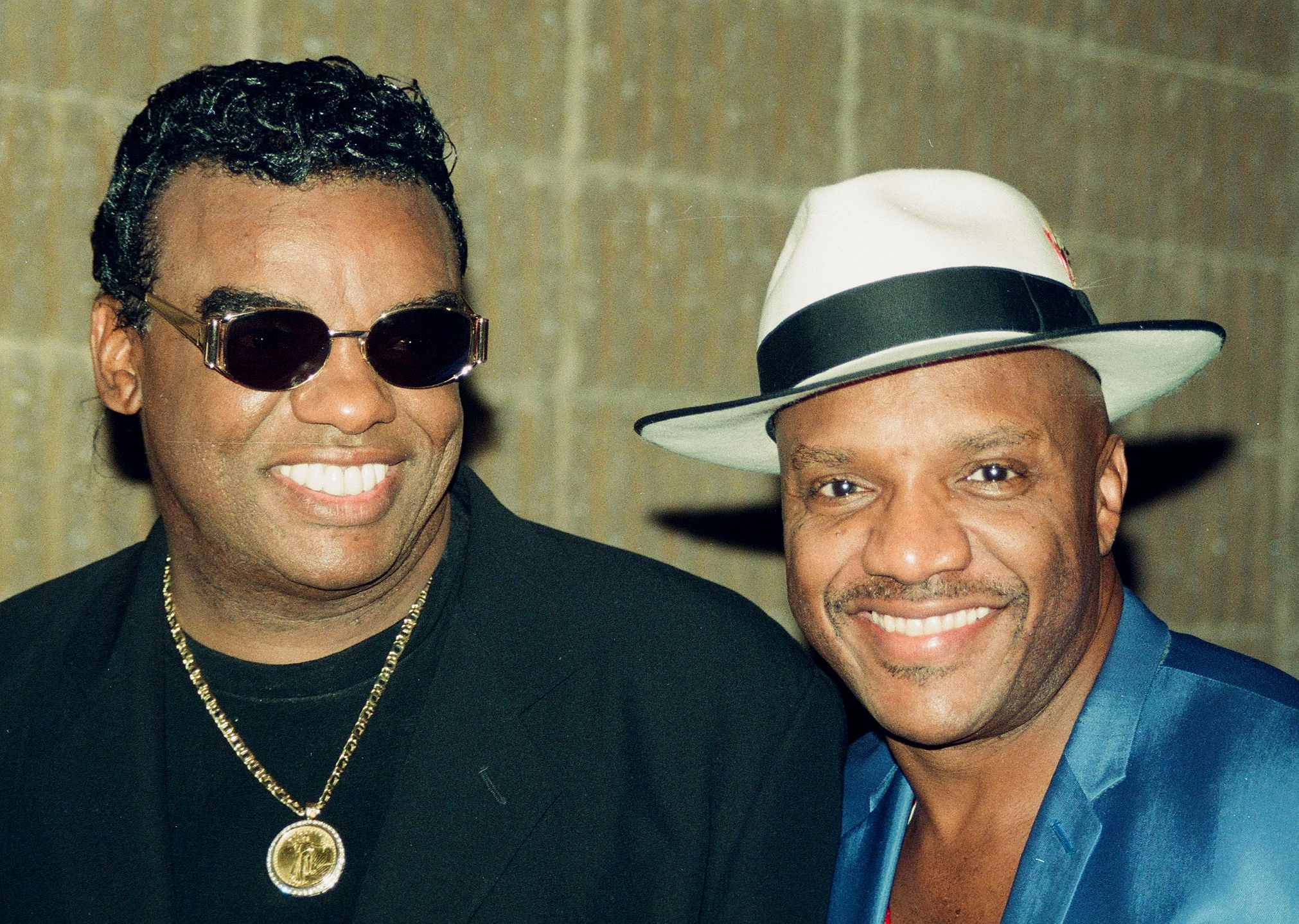 Wash. D.C. 1996